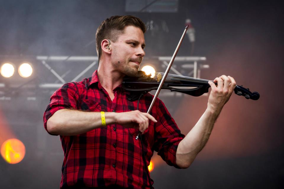 Viulisti Antti Untamala